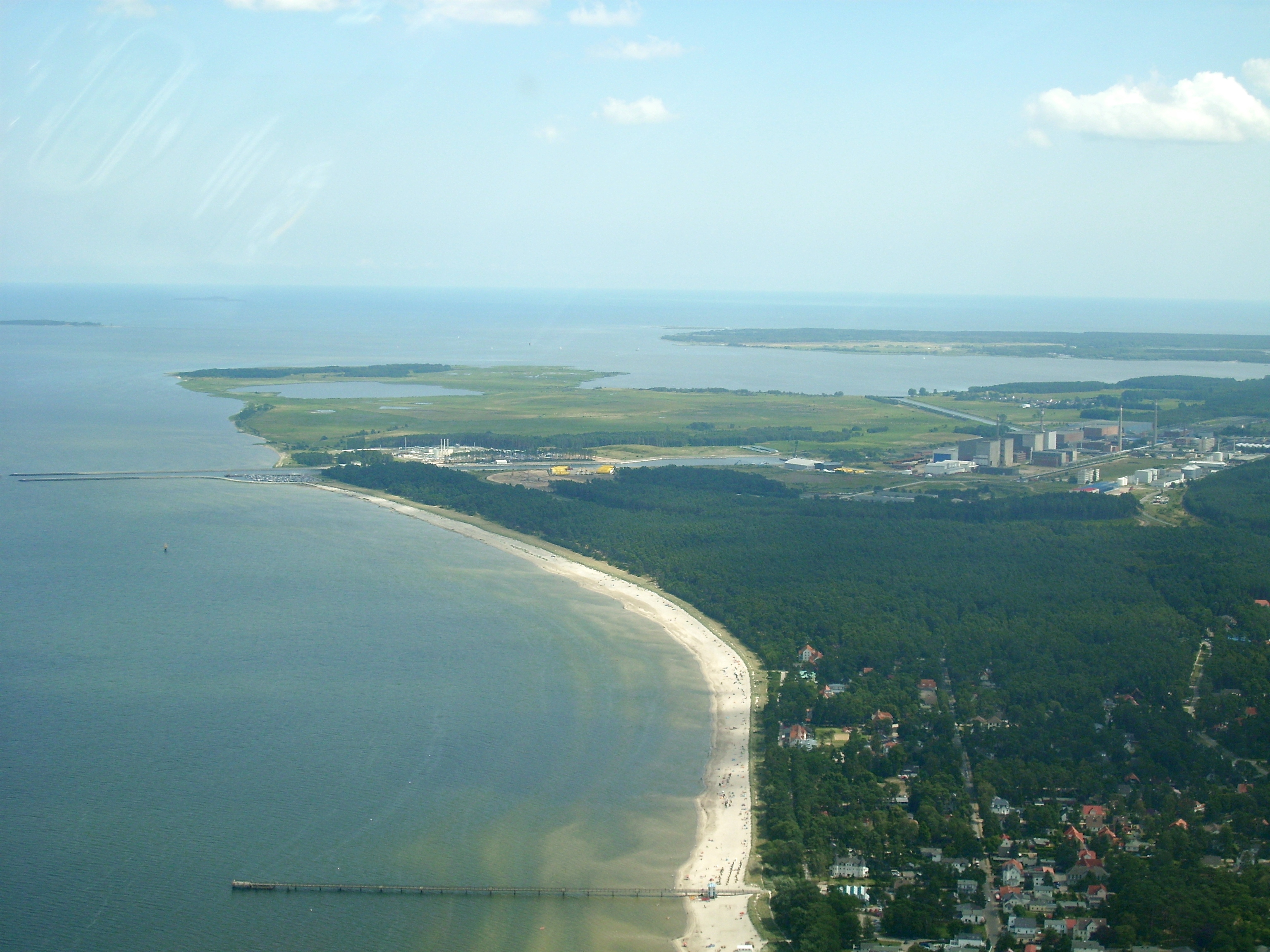 Blick nach Ostnordosten über Lubmin, das Kernkraftwerk und Usedom